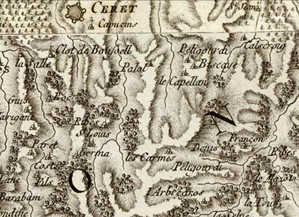 Carte Cassini (1779) de Céret et Palol